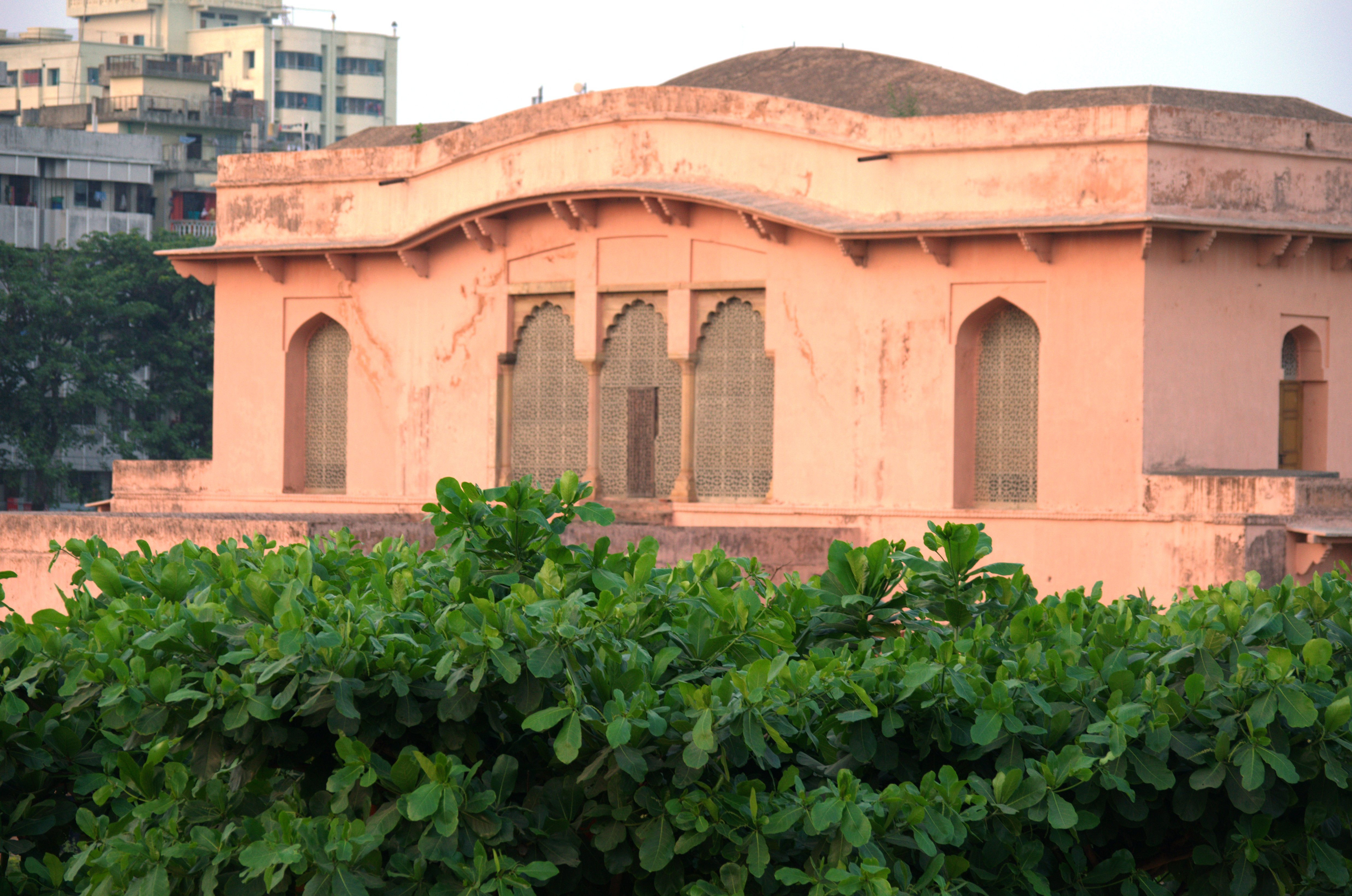 লালবাগ দুর্গ